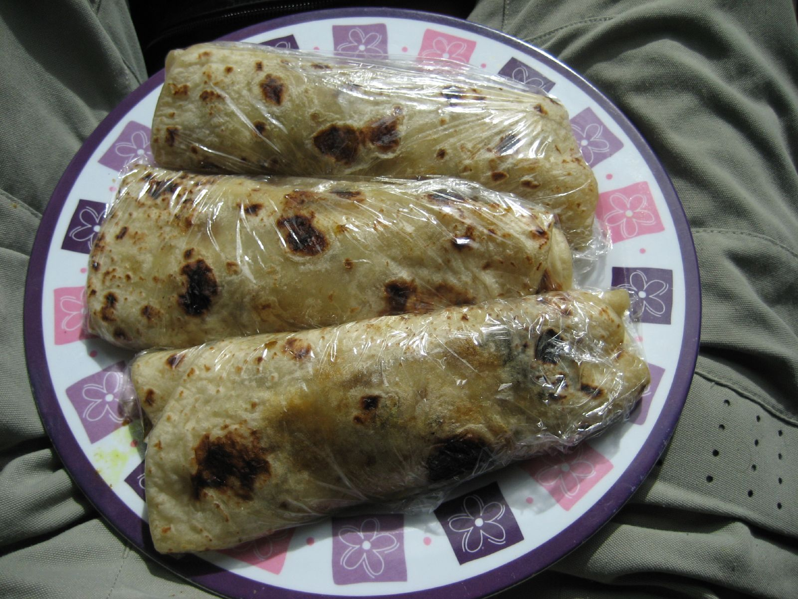 Roti's!